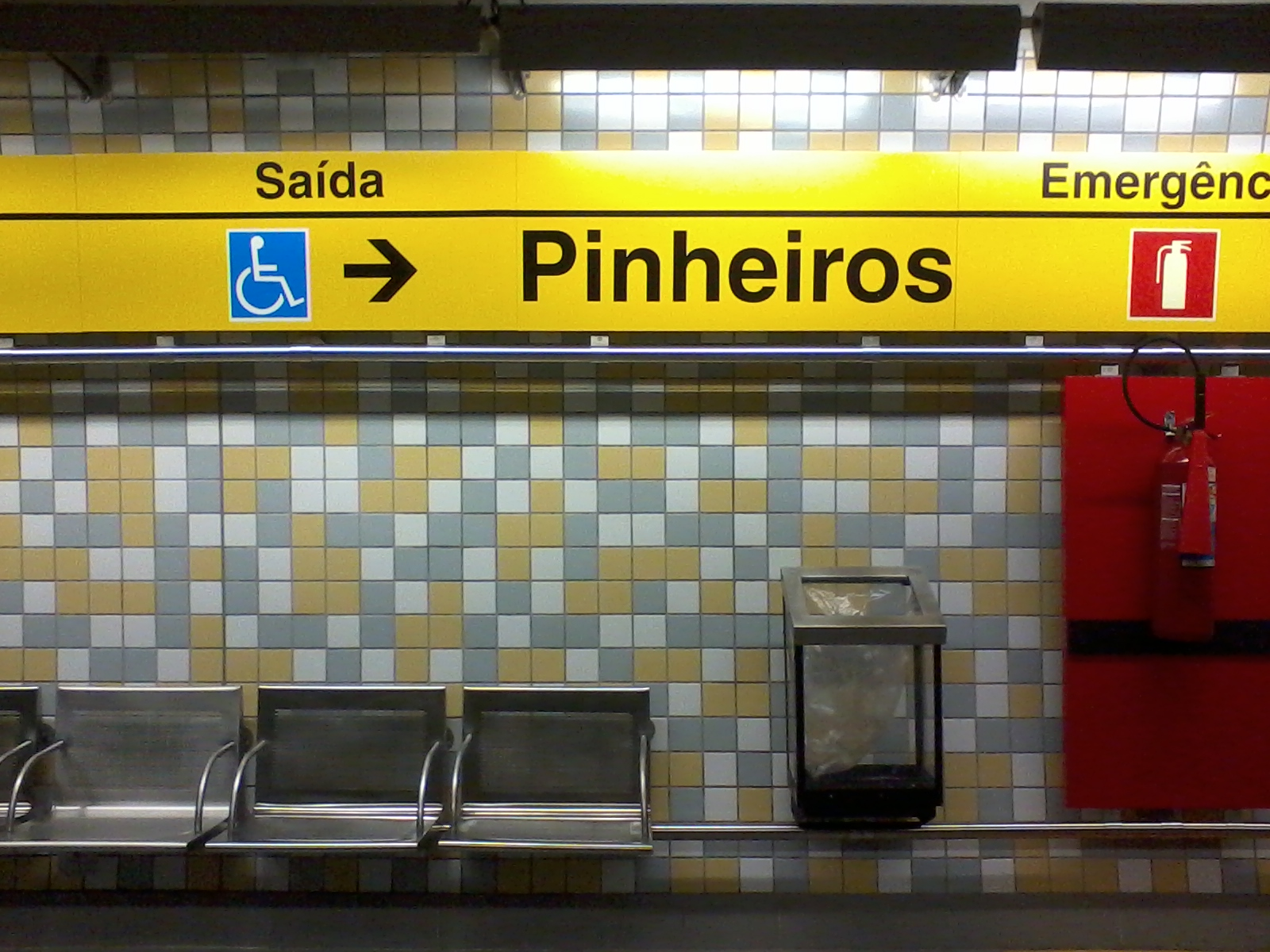 Estação Pinheiros, da Linha 4-Amarela do Metrô.